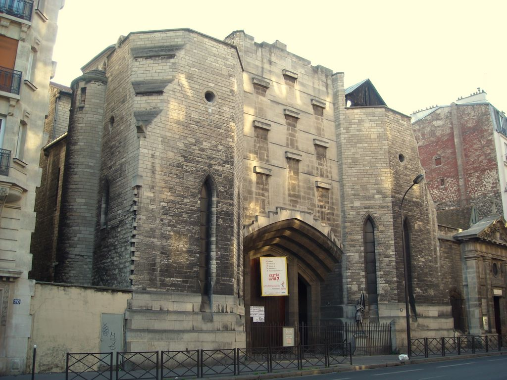 Extérieur (façade ouest) de la basilique Sainte Jeanne d'Arc